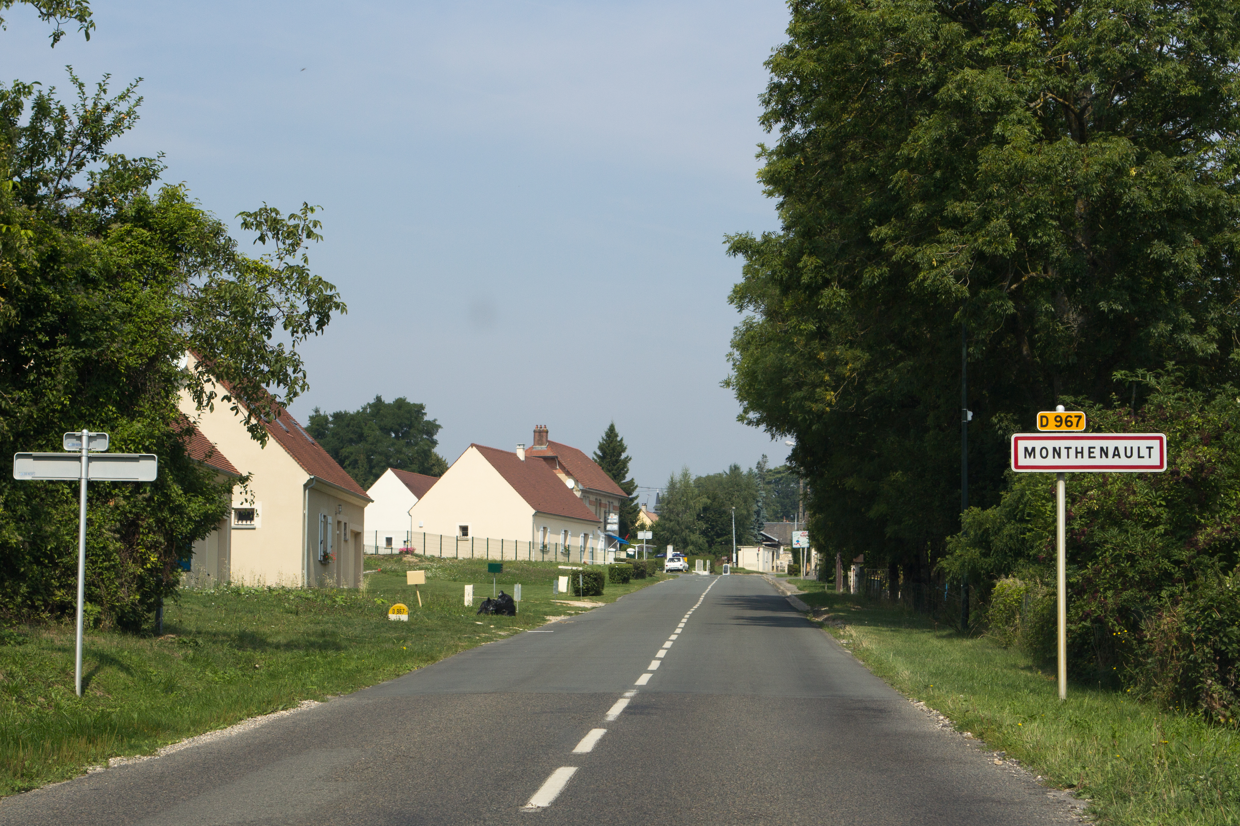 Vue de Monthenault, Monthenault, Aisne, France